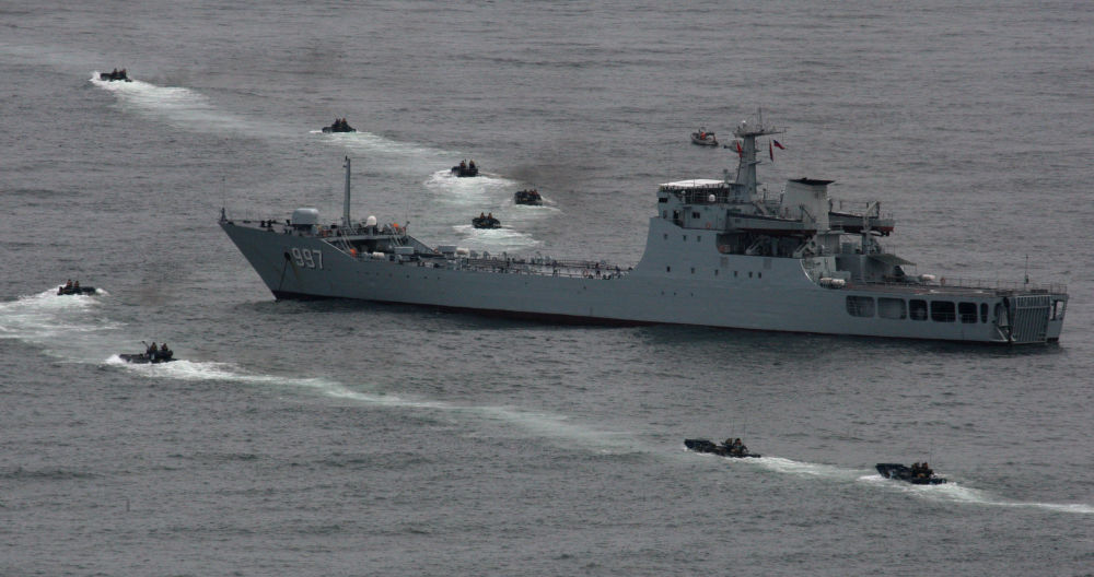 Десантный корабль Военно-морских сил Народно-освободительной армии КНР "Юньвушань" готовится принять на борт боевые машины пехоты на российско-китайских военно-морских учениях "Морское взаимодействие - 2015" на полигоне Клерк в Приморском крае.